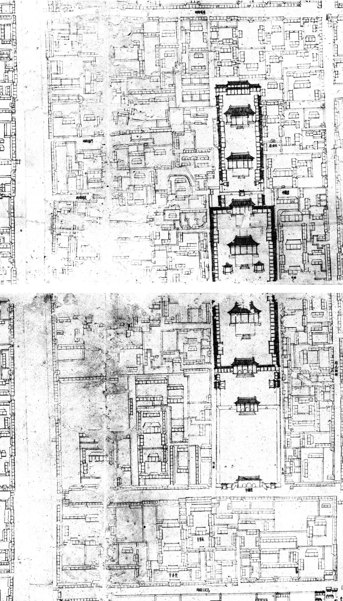 乾隆十五年（1750年）完成的《乾隆京城全图》中的护国寺及其附近地区。本图来自清內務府藏京城全圖，故宮博物院影印，民國二十九年十二月（1940年）。护国寺南、北两部分原在该图的不同页，故本图为本人拼接而成，拼接时难免有差错，请自行查阅原图校对。